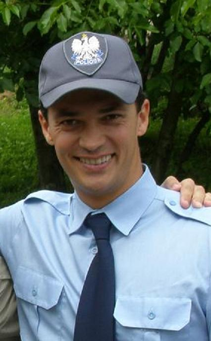 Rafał Cieszyński na planie serialu Ojciec Mateusz (Sandomierz, Góry Pieprzowe) rok 2009